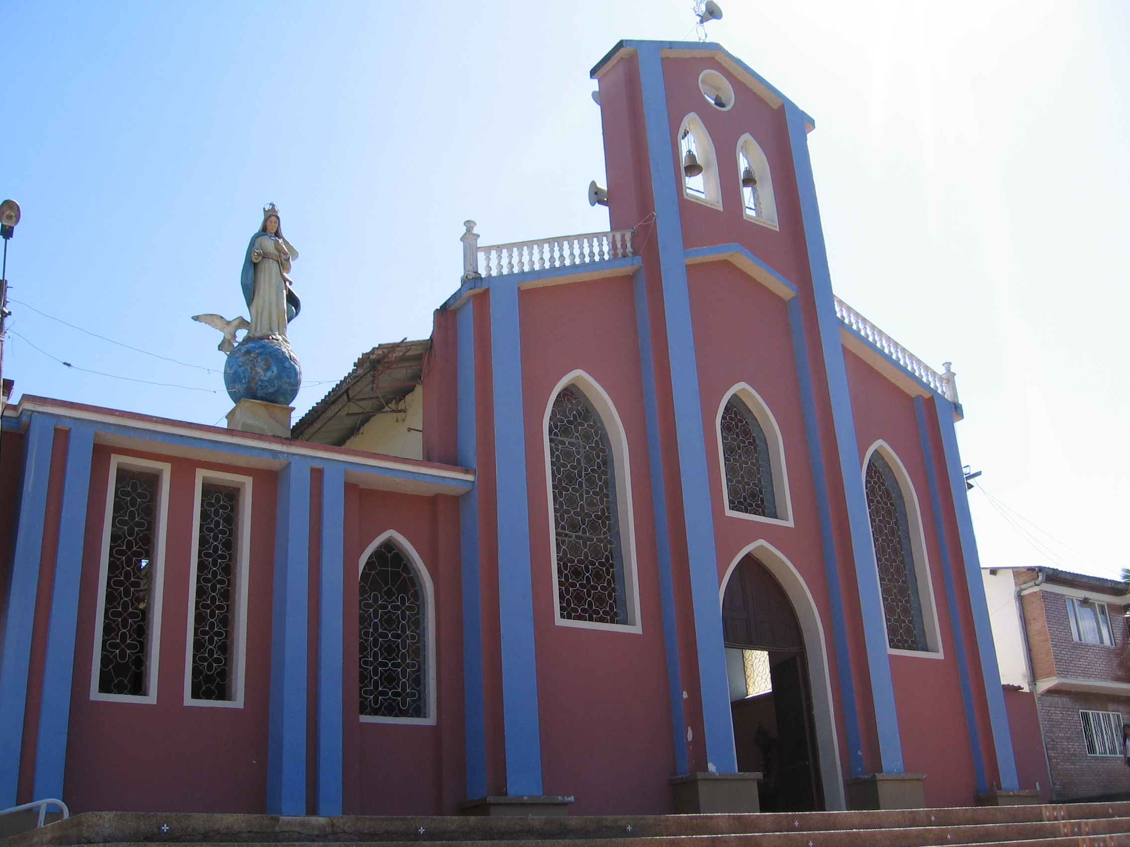 Foto de la Iglesia de Berbeo